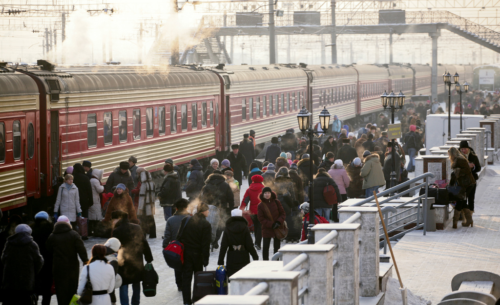 Поезд Италмас на Ижевском вокзале